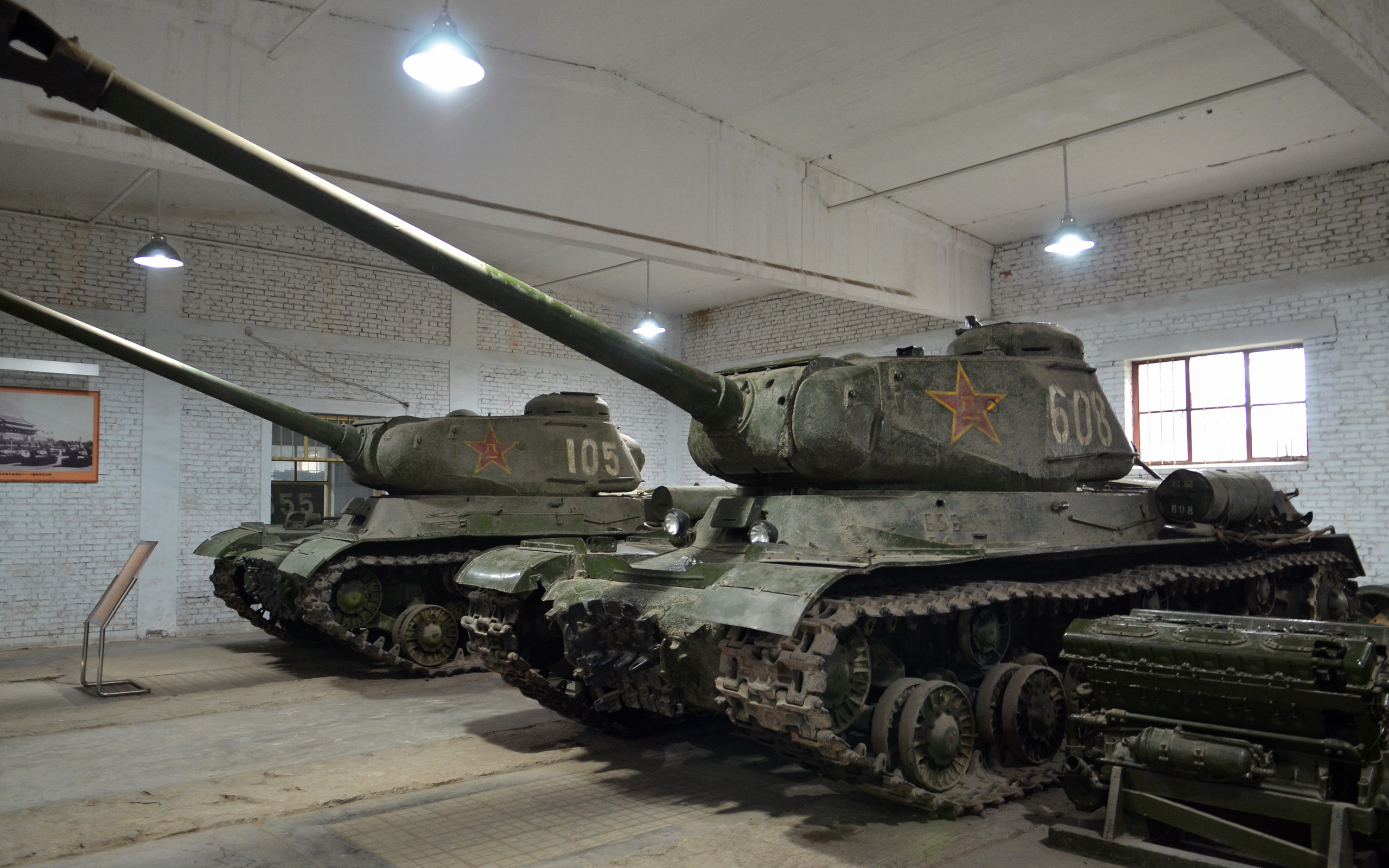 保存在中国人民解放军坦克博物馆的苏制IS-2坦克